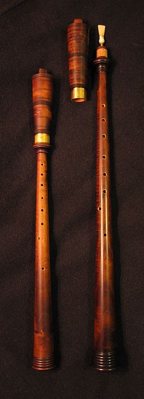 Sopránova a sopraninová rauschpfeife